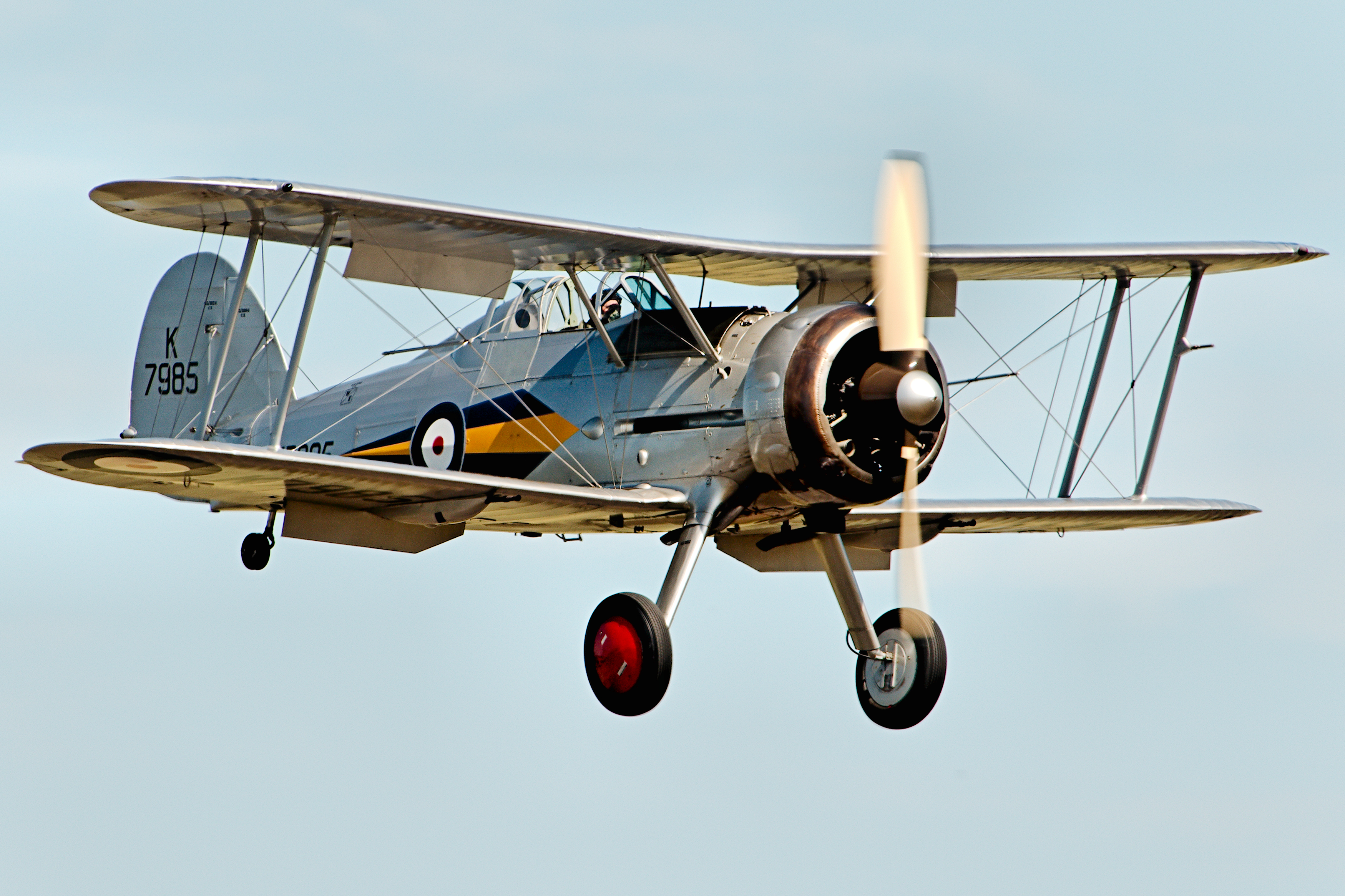 Gloster Gladiator - Flying Legends 2015